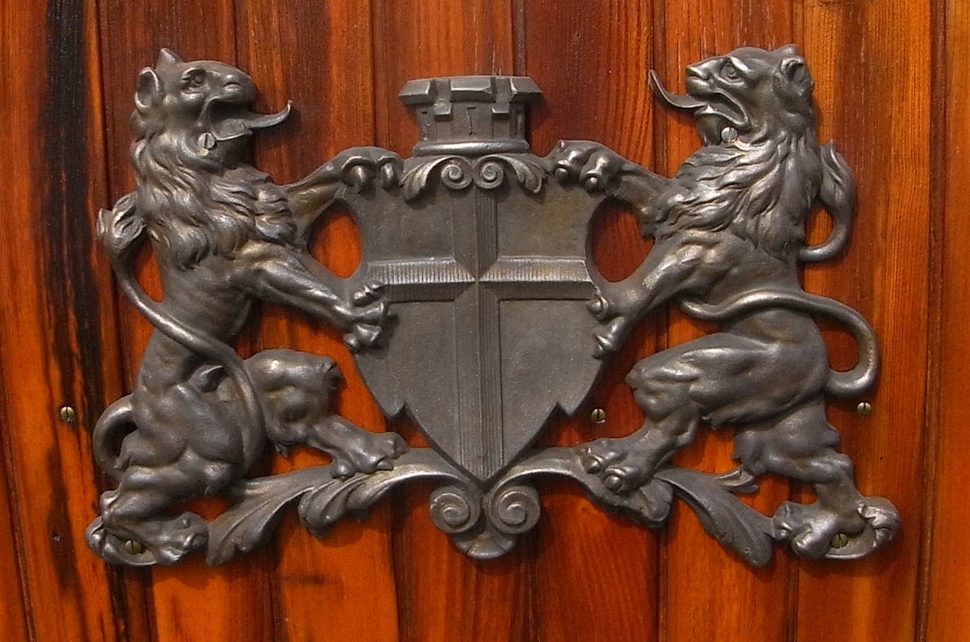 Bilder einer historischen Freiburger Straßenbahn Wappen auf der Straßenbahn